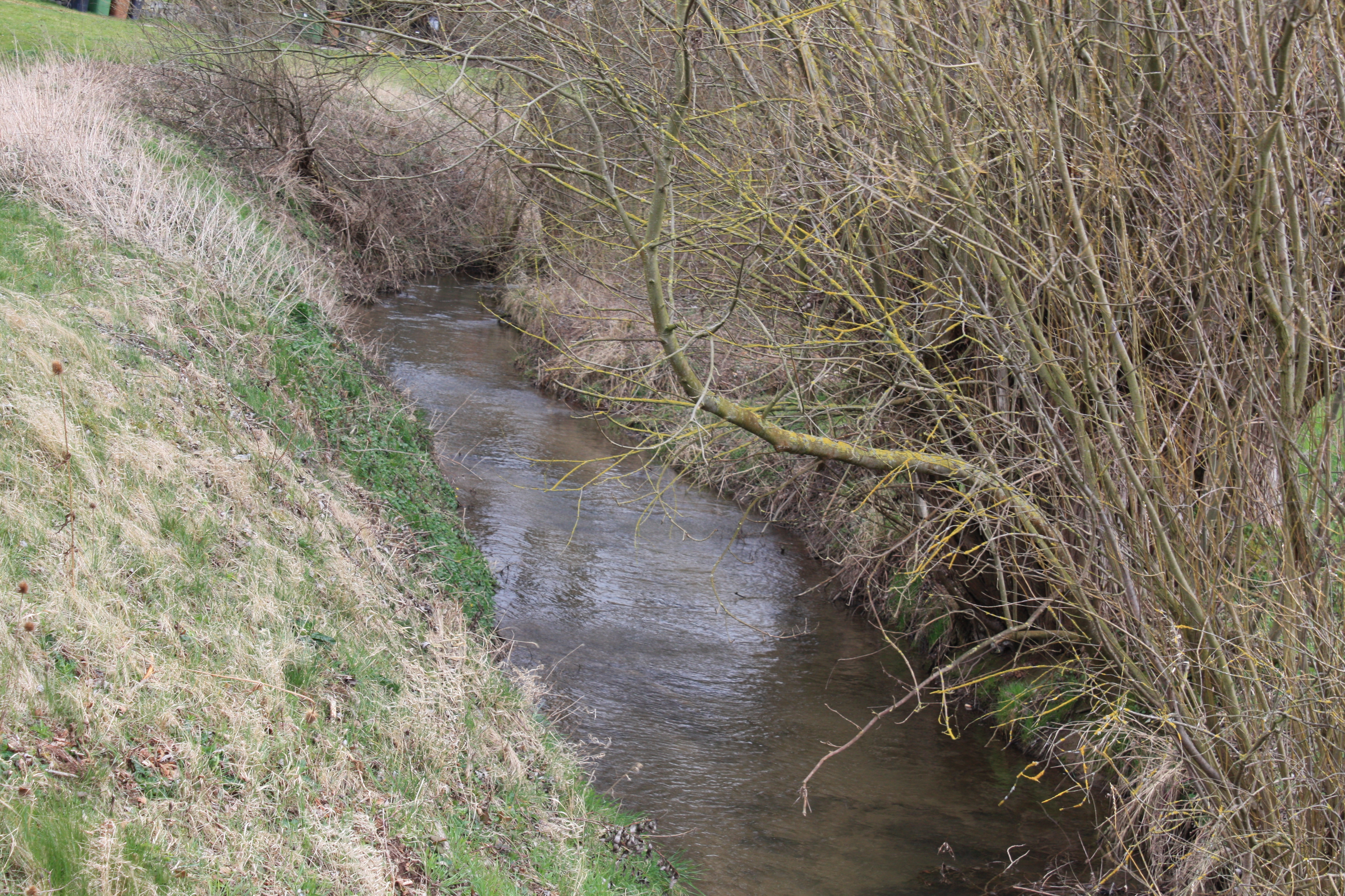 Die Nebelbeeke in Westuffeln, ca. 2 km vor ihrer Mündung in Obermeiser in die Warme.